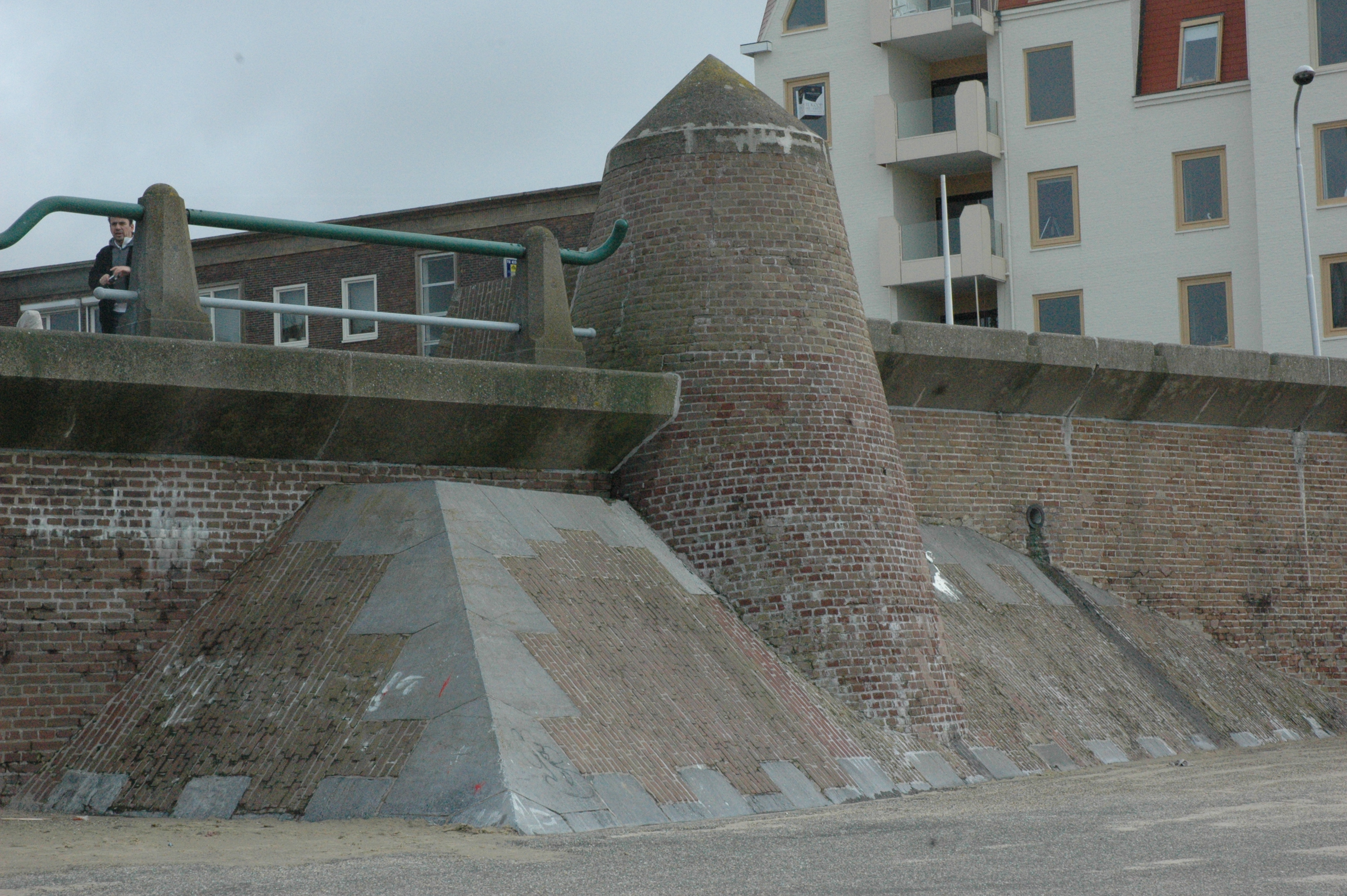 De Westbeer op de boulevard in Vlissingen.